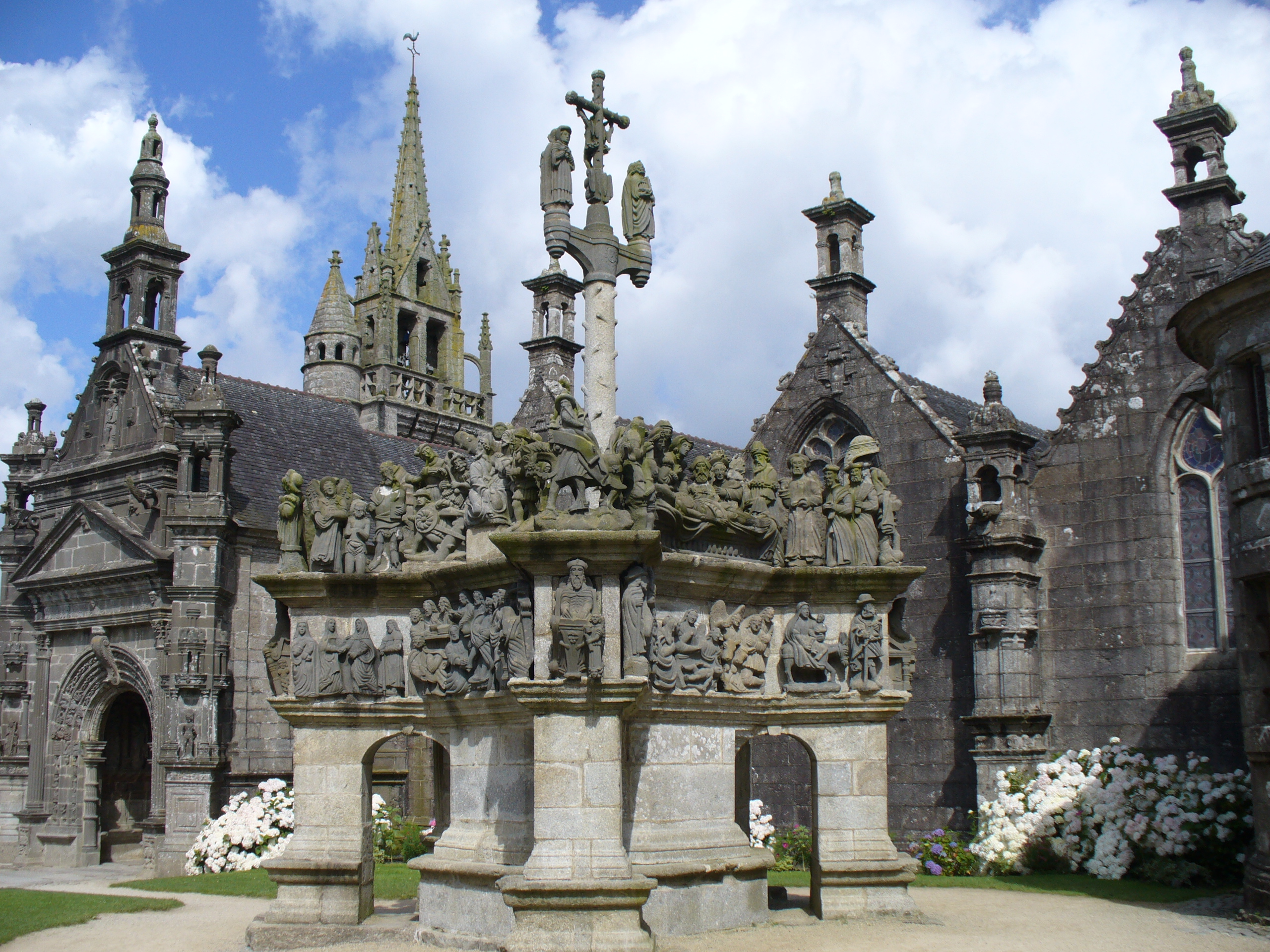 Calvaire-Kalvarienberg von Saint Miliau in Guimiliau zwischen 1581 und 1588 errichtet zeigt mit insgesamt 200 Figuren 17 Passionsszenen im Turm und im Fries 15 Szenen aus dem Leben Jesu. Enclos Paroissal-Umfriedeter Pfarrbezirk